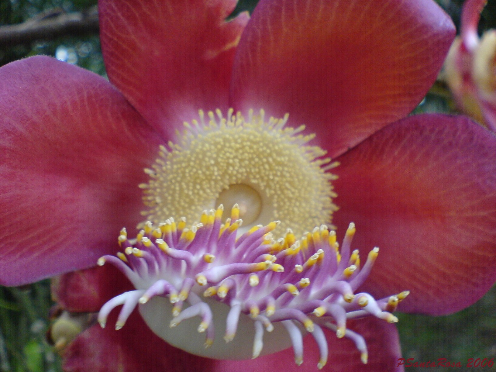 Jardim Botânico do Rio de Janeiro - Fevereiro de 2006 Descrição Flor de Abricó de Macaco - Couroupita guianensis - Foto tirada no Jardim Botânico do Rio de Janeiro/Brasil com Sony Ericsson k750i exposição 1/60 abertura f/2.8